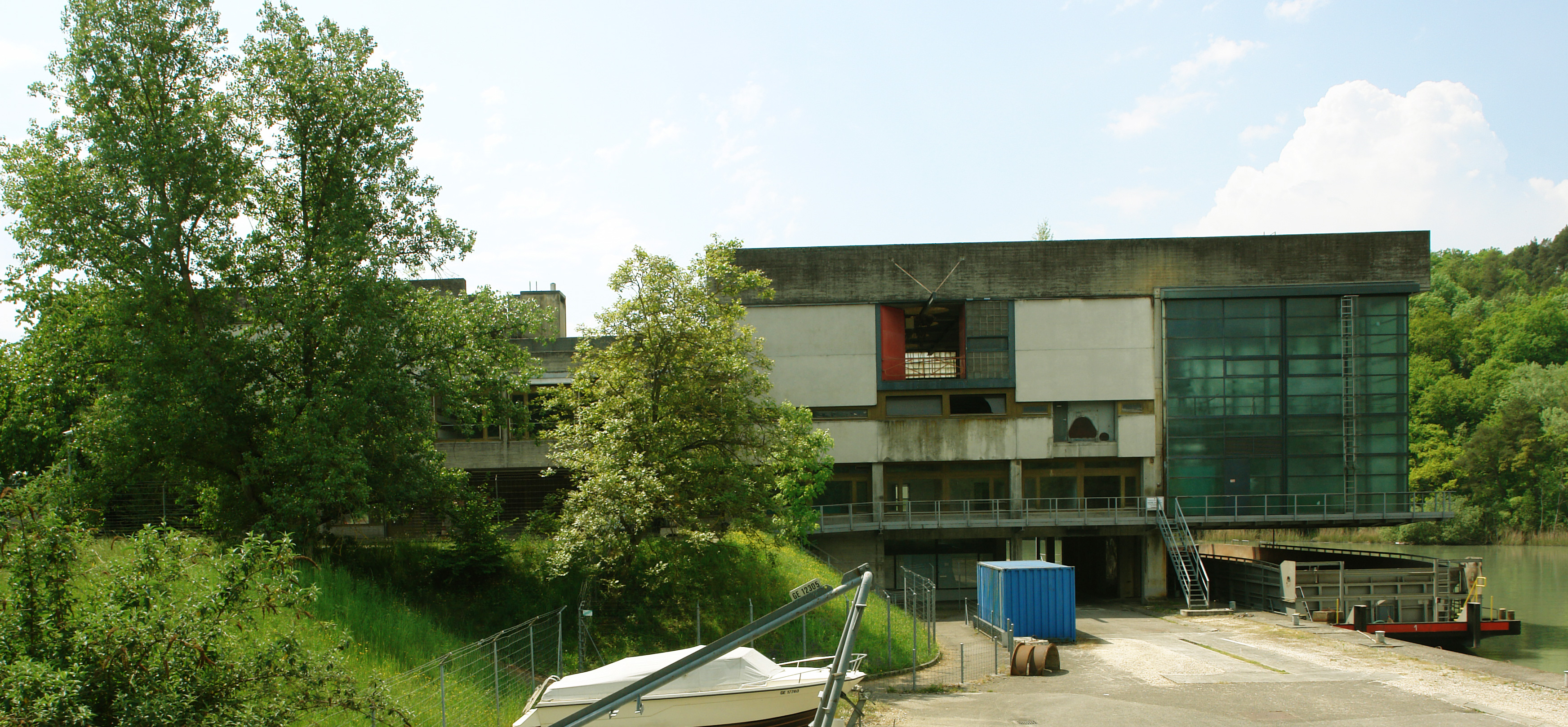 Sewage plant, Vernier, 1964-67 in Switzerland, Architect: Georges Brera, Solid waste terminal